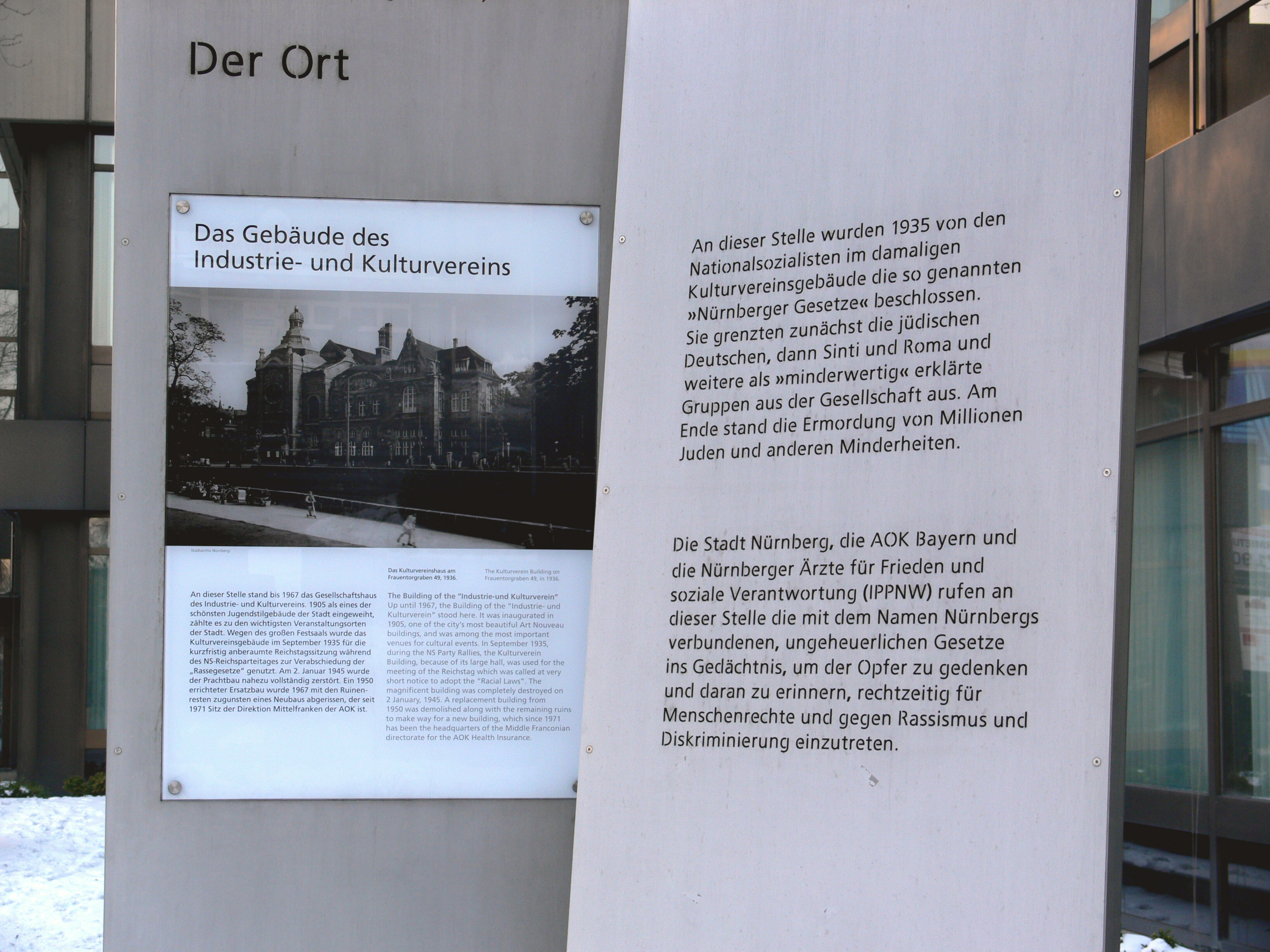 Informationstafel in Nürnberg, Frauentorgraben 49. An dieser Stelle stand der Saalbau des Industrie- und Kulturvereins, in dem der eigens einberufene Reichstag die Nürnberger Gesetze verabschiedete. Dieses Gebäude wurde 1945 stark zerstört, ein Nachfolgebau von 1950 wurde 1967 abgerissen. Heute befindet sich dort ein Bürohochhaus, das die Direktion Mittelfranken der AOK beherbergt.